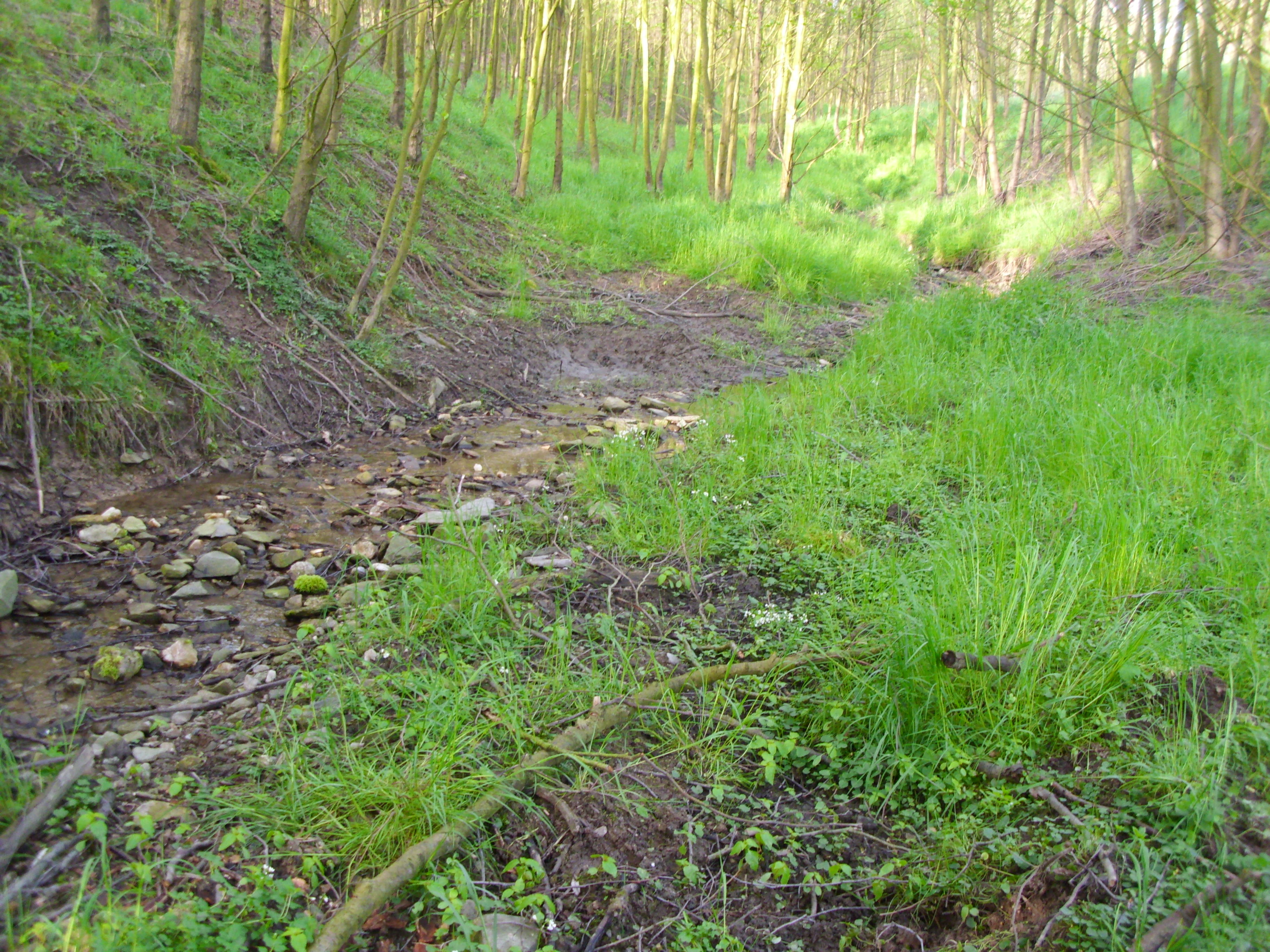 Dieser beginnt am Aschenberg bei Seifersdorf und geht in den Seifersdorfer Grund über.